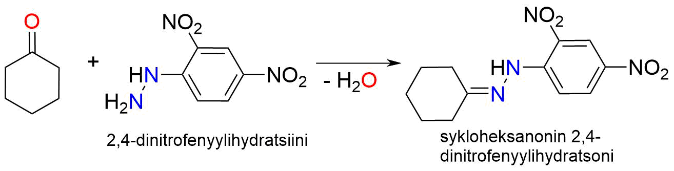 Aldehydit ja ketonit muodostavat helposti 2,4-dinitrofenyylihydratsoneja, jotka ovat kiinteitä yhdisteitä ja niitä käytetään aldehydien ja ketonien identifiointiin ja eristämiseen